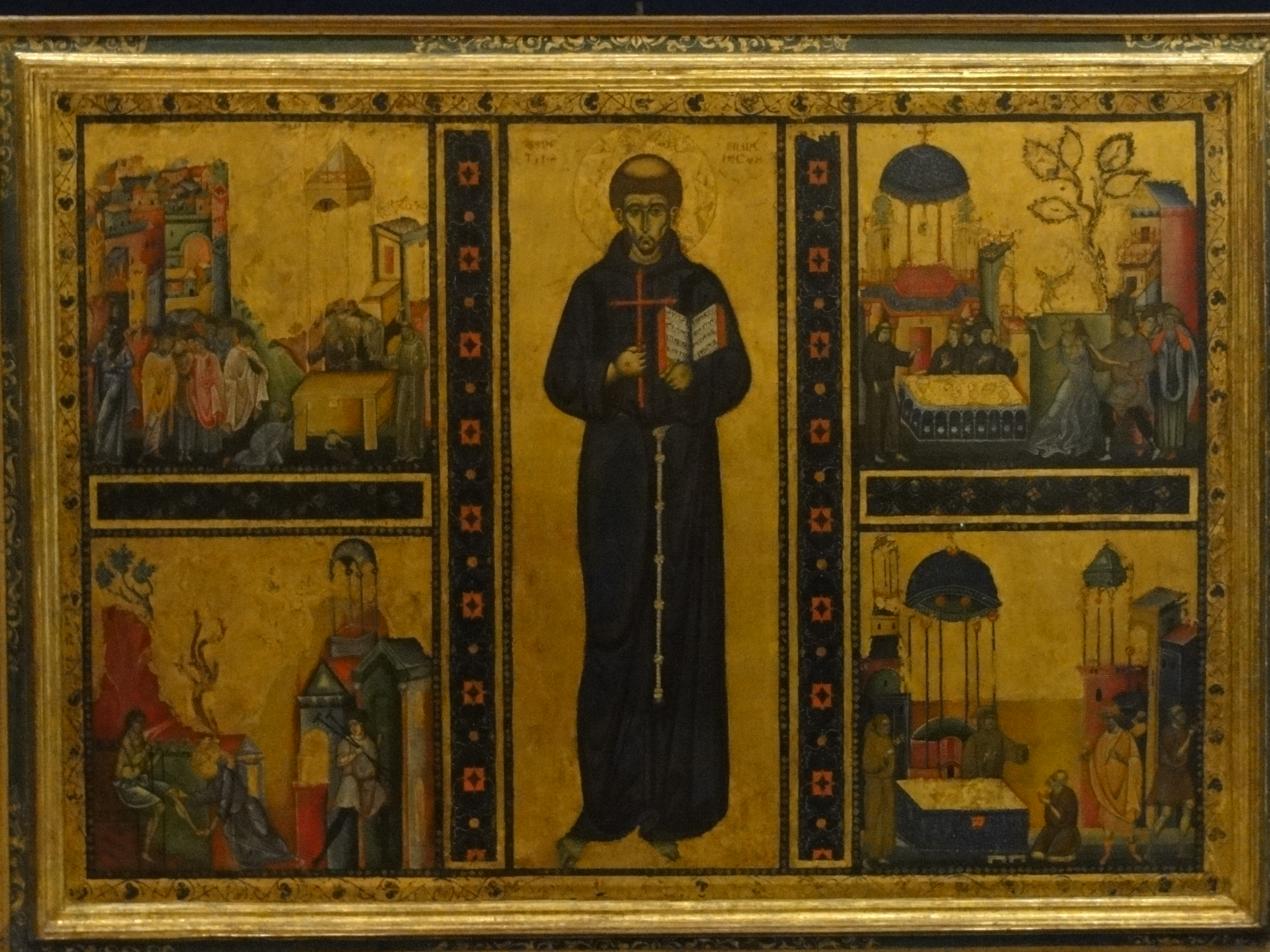 Assisi, Museo del Tesoro della Basilica di San Francesco, San Francesco e quattro miracoli (secondo terzo del XIII sec.), tavola dipinta del Maestro del Tesoro di San Francesco.